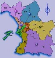 Le découpage des arrondisements de Marseille